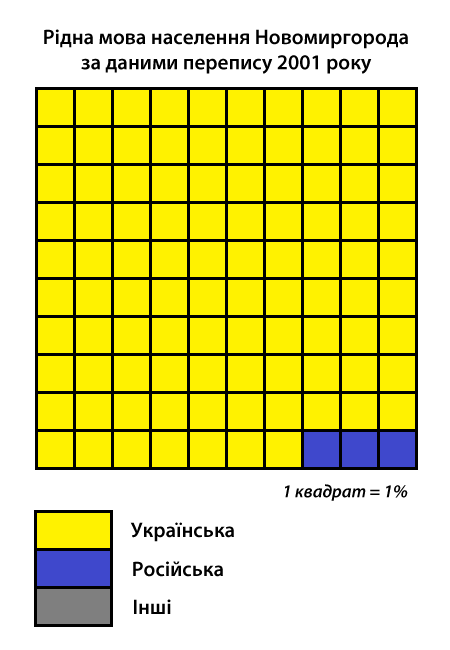 Інфографіка розподілу населення міста Новомиргород за рідною мовою згідно з даними перепису 2001 року. Джерело: Розподіл населення Кіровоградської області за рідною мовою (у % до загальної чисельності населення) за переписом 2001 року